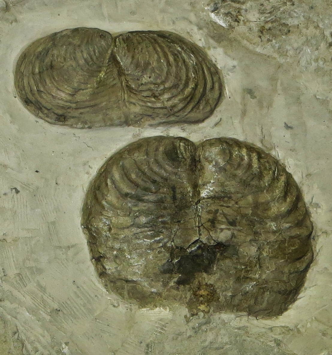 Fossil of Inoceramus, an extinct mollusc - Took the picture at Museo di Scienze Naturali di Bergamo